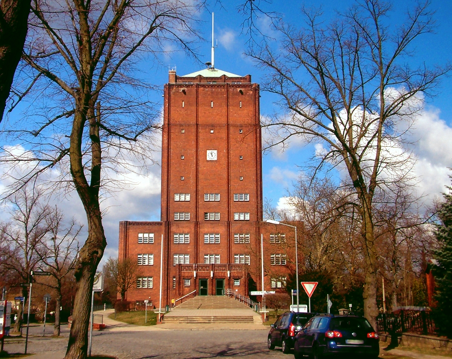 Town hall of Neuenhagen bei Berlin